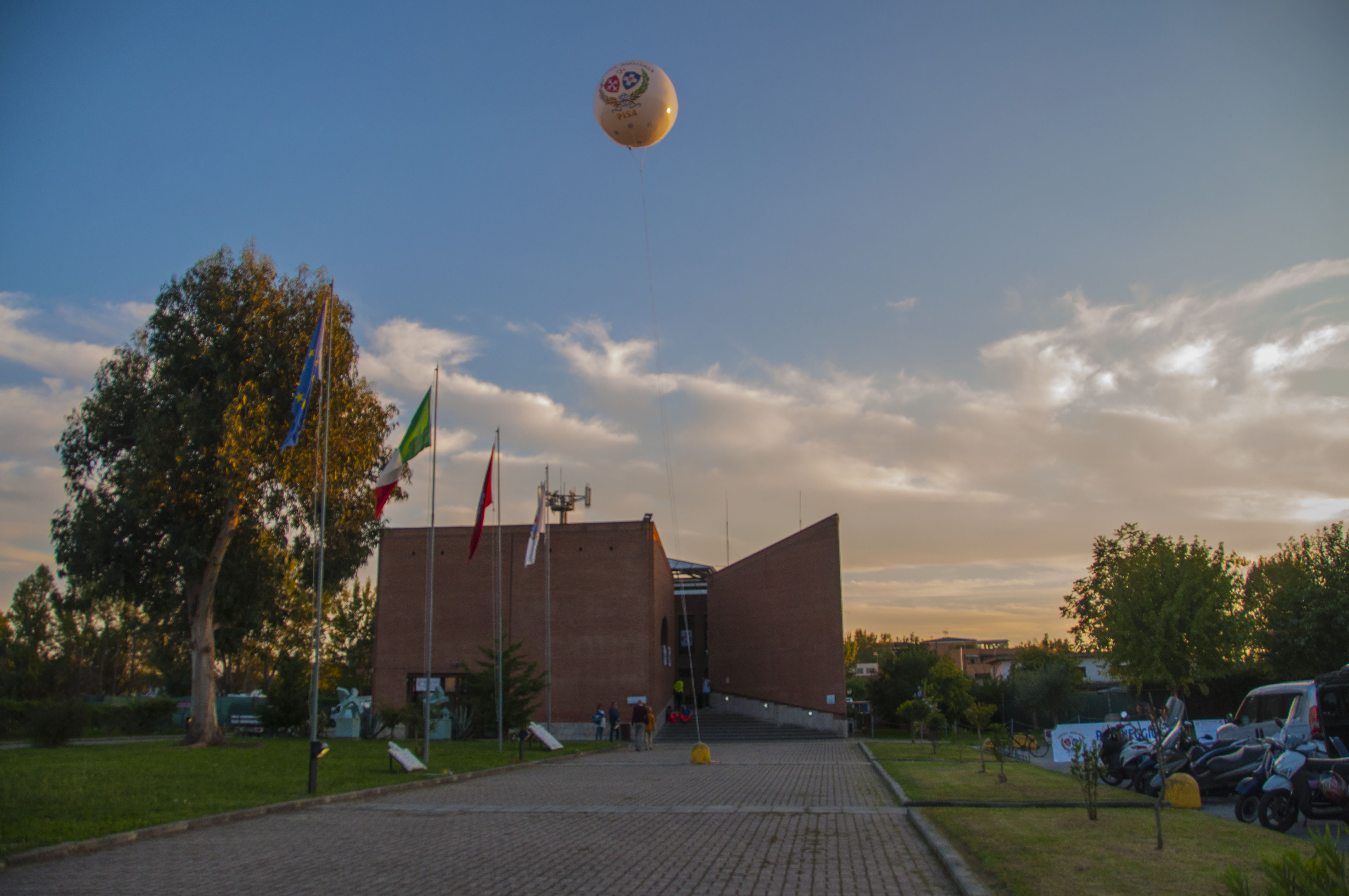 La sede inaugurata nel 1992 in via Italo Bargagna.